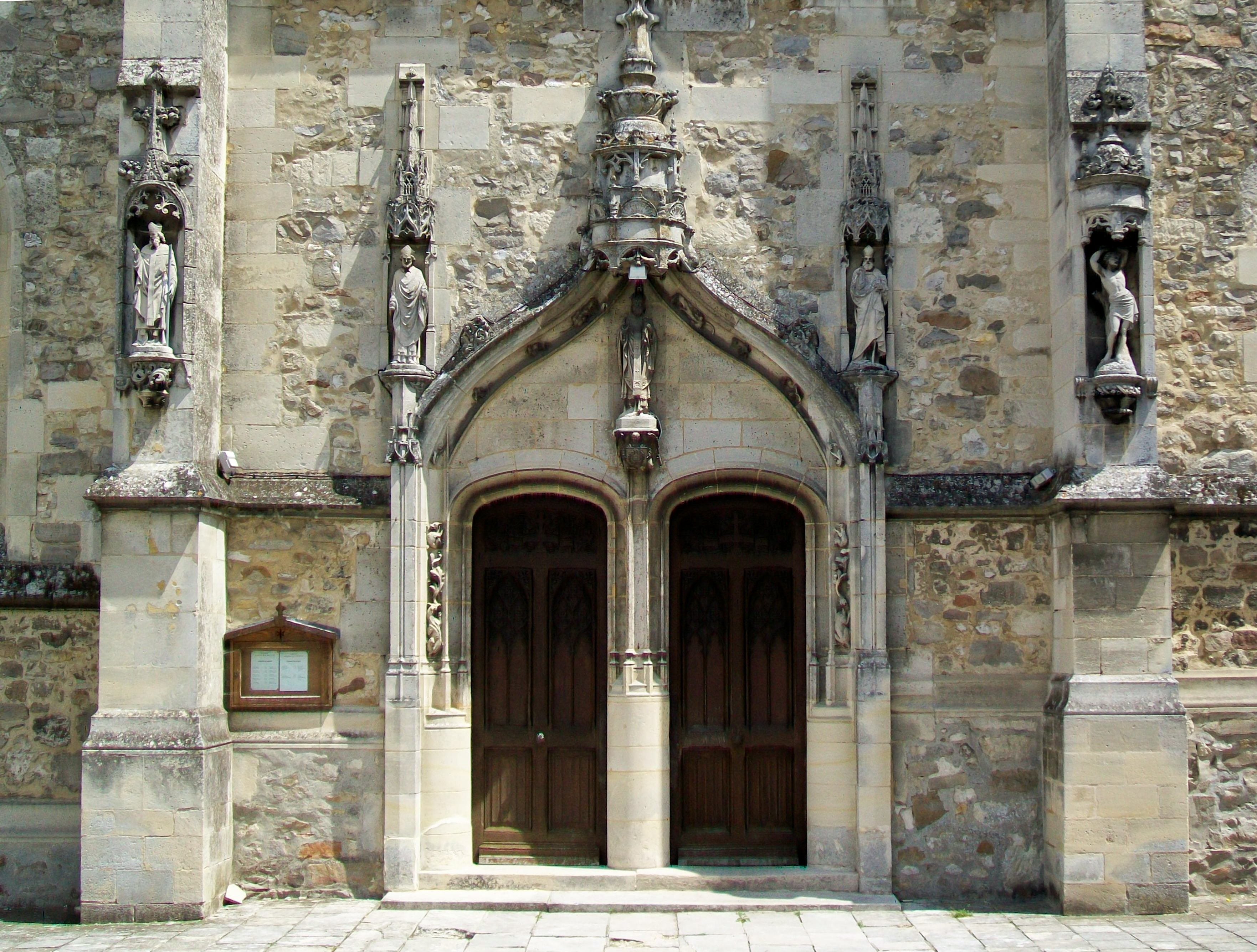 Le portail de l'église Saint-Martin.